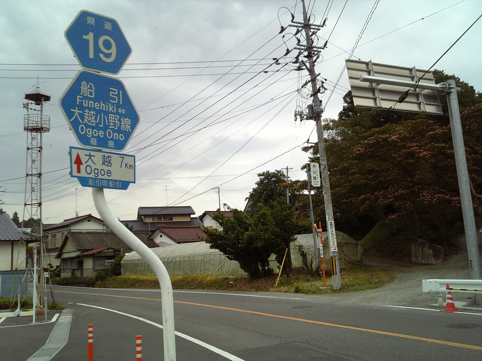 福島県道19号船引大越小野線。田村市船引町の国道288号交点付近。